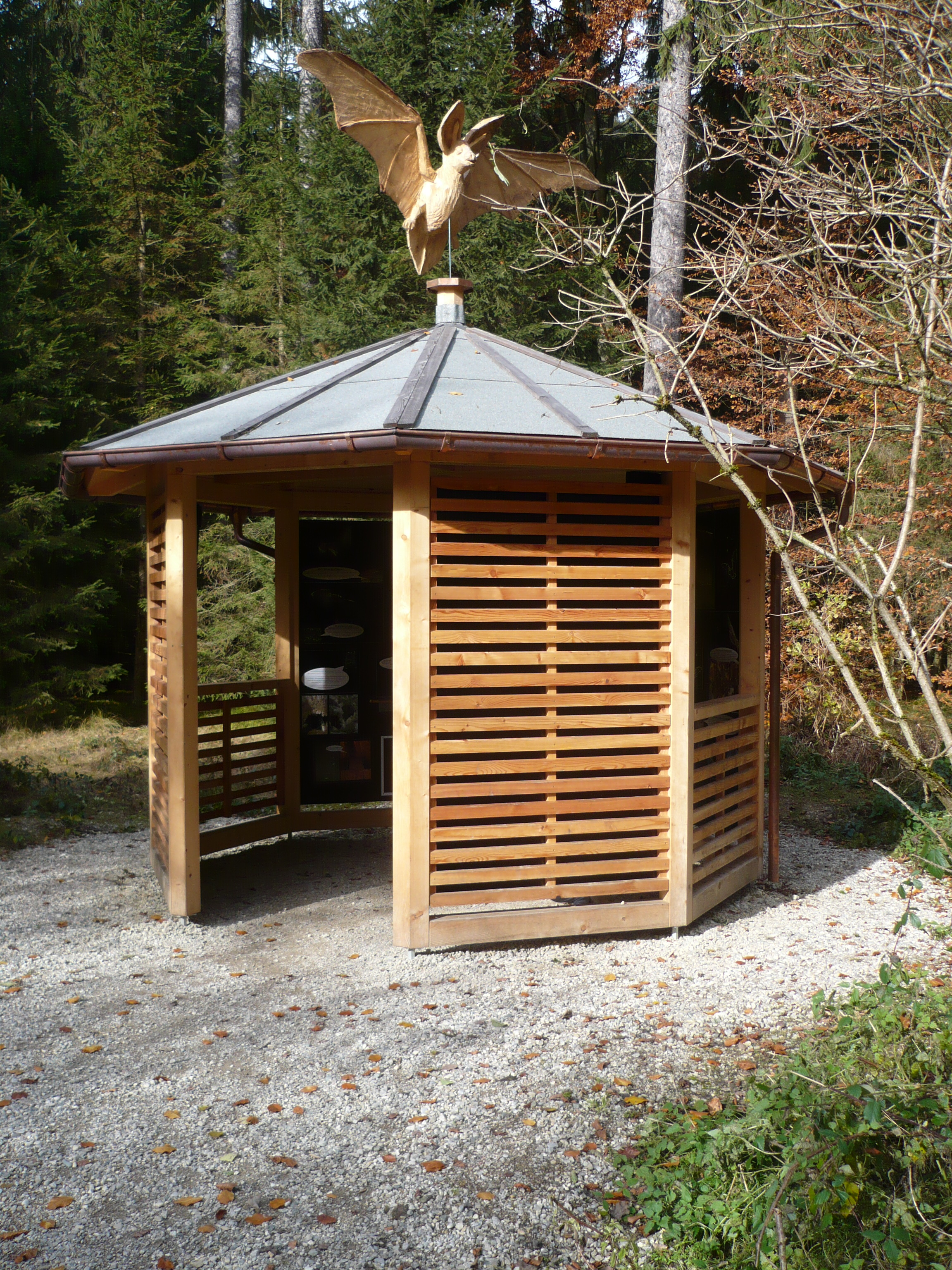 Fledermauspavillon an der Hohenlindener Sauschütt, Deutschland